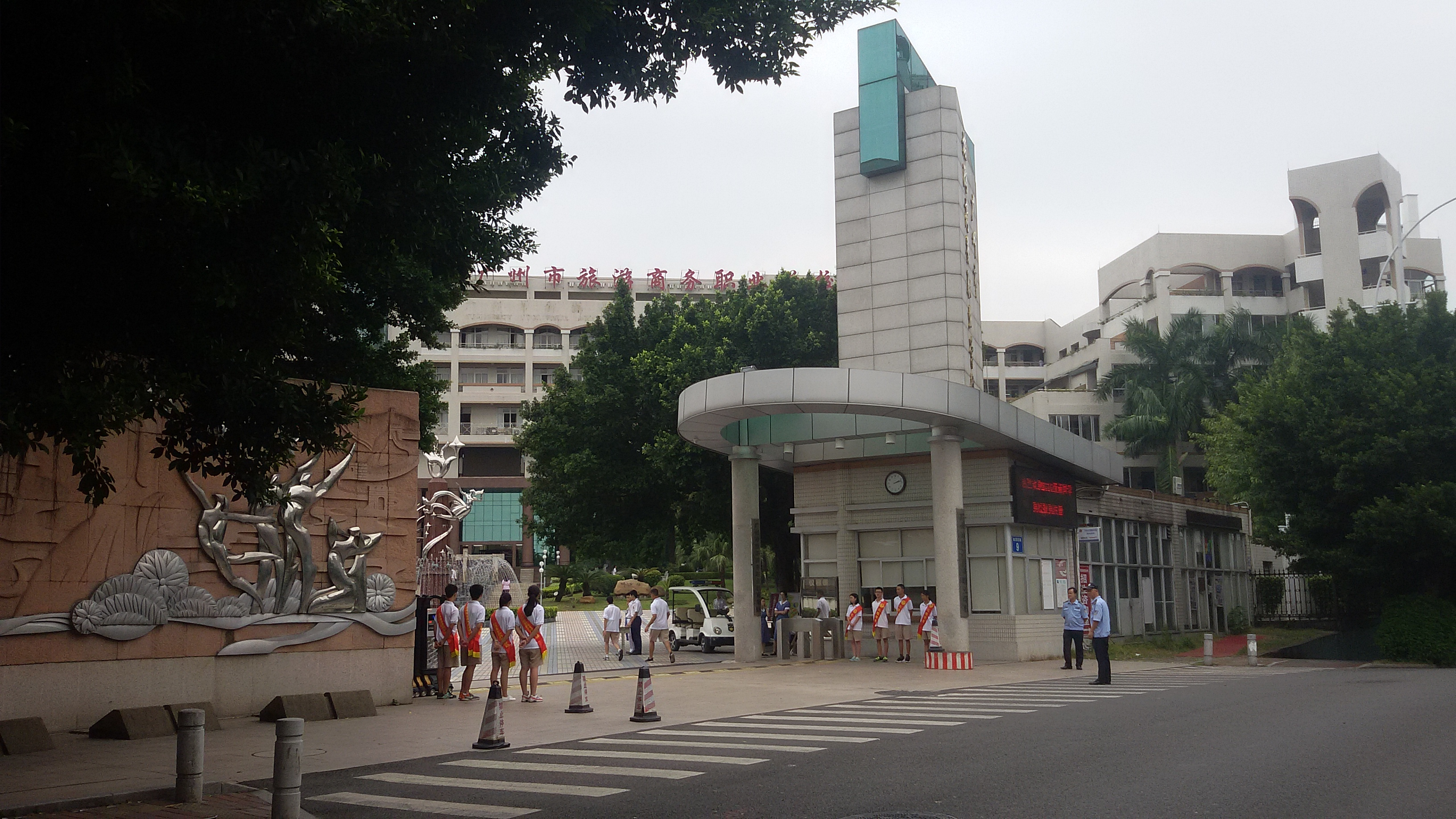 粵語: 廣州市旅遊商務職業學校嘅正門